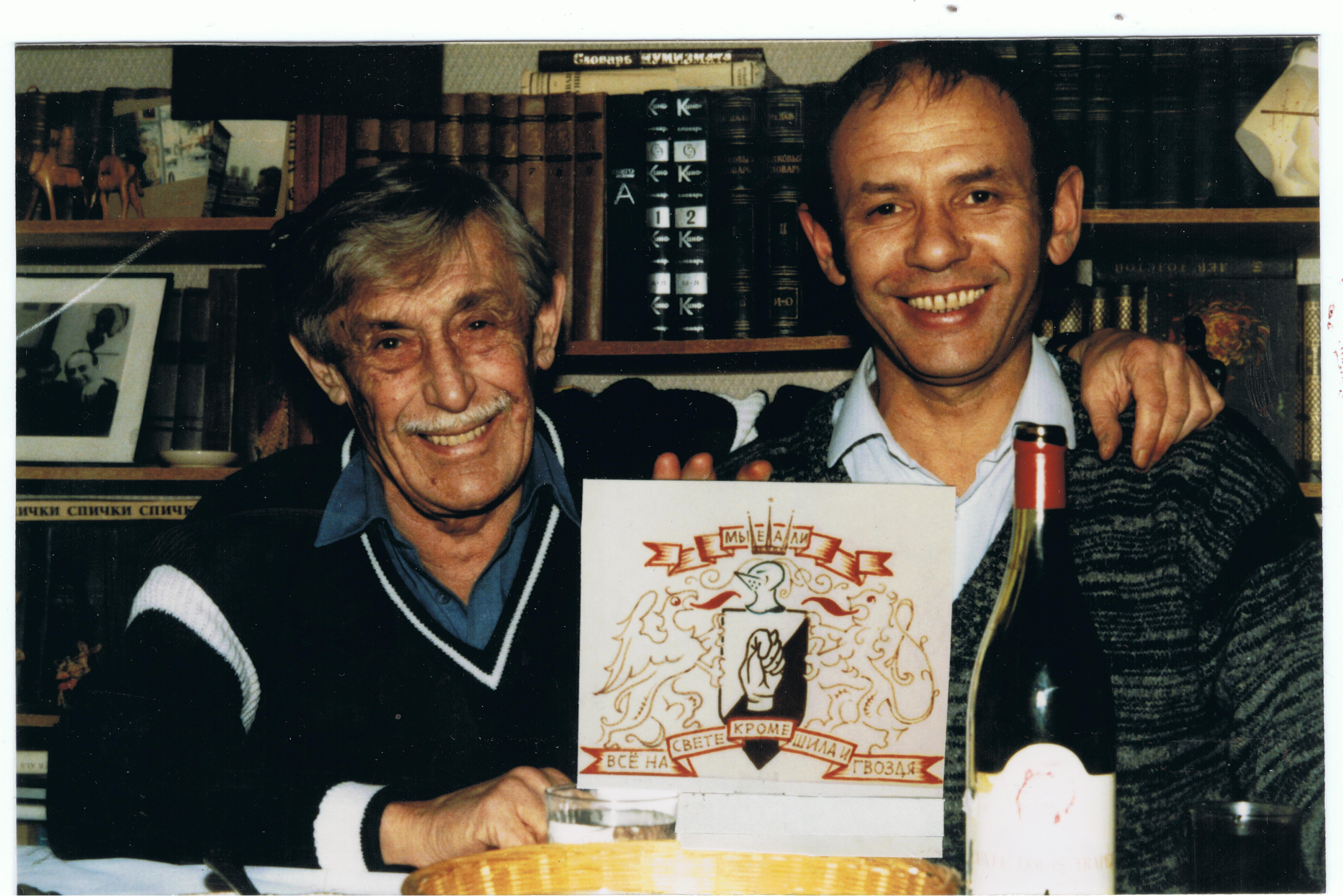 Виктор Некрасов и Виктор Кондырев, Ванв, 1985